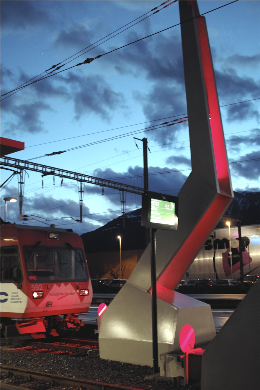 Aigle (Vaud), place de la gare, quai 11 des TPC (transports publics du chablais), train AOMC, cinéma Cosmopolis derrière, de nuit